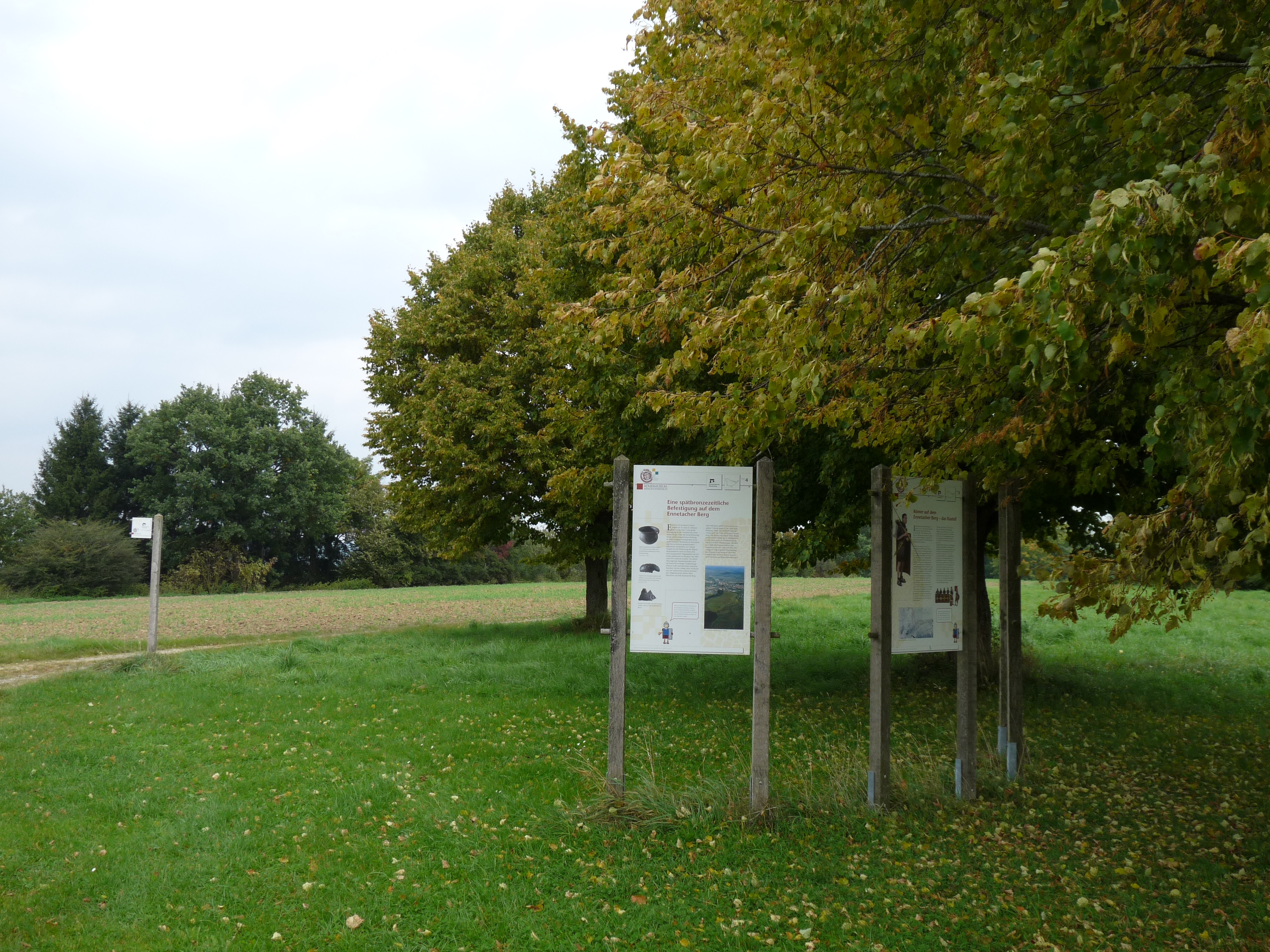 Camino arqueológico cerca de Ennetach